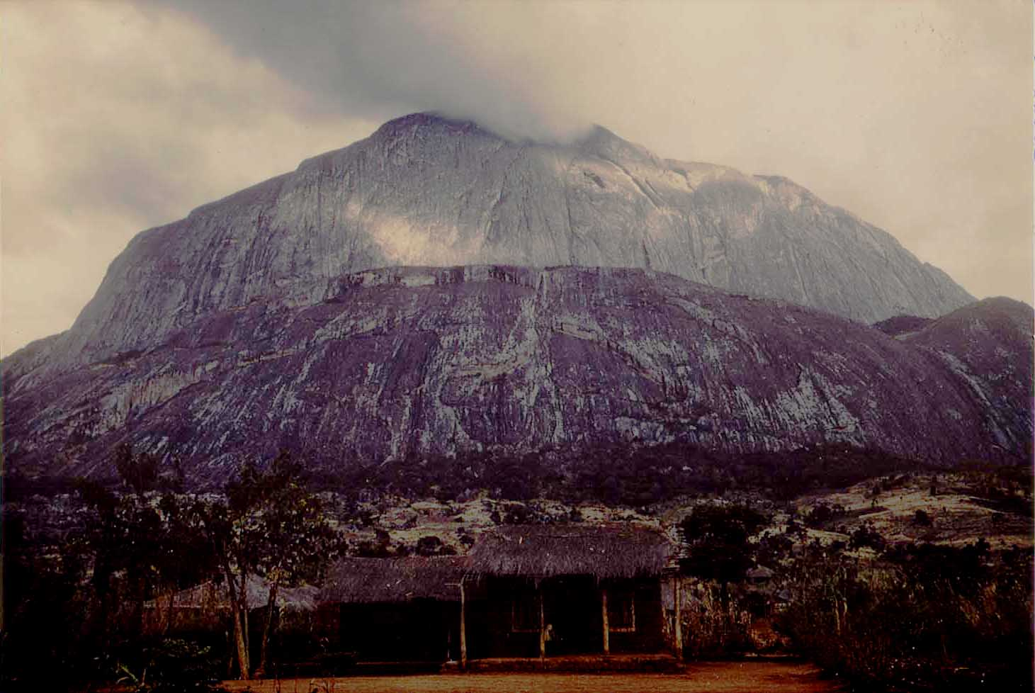 Chambe-Gipfel - Mulanje Massiv - Malawi - Afrika